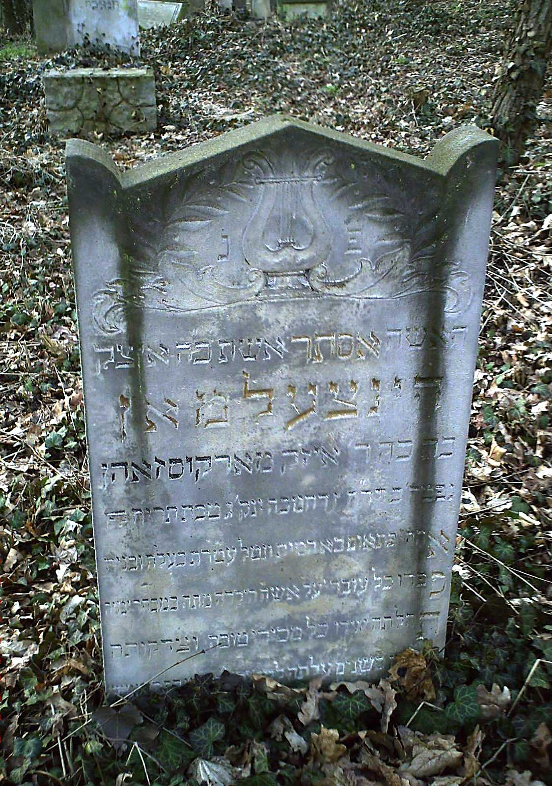 Macewa z motywem liry i widocznymi śladami polichromii na cmentarzu żydowskim w Skwierzynie (woj. lubuskie). Autor: Shalom